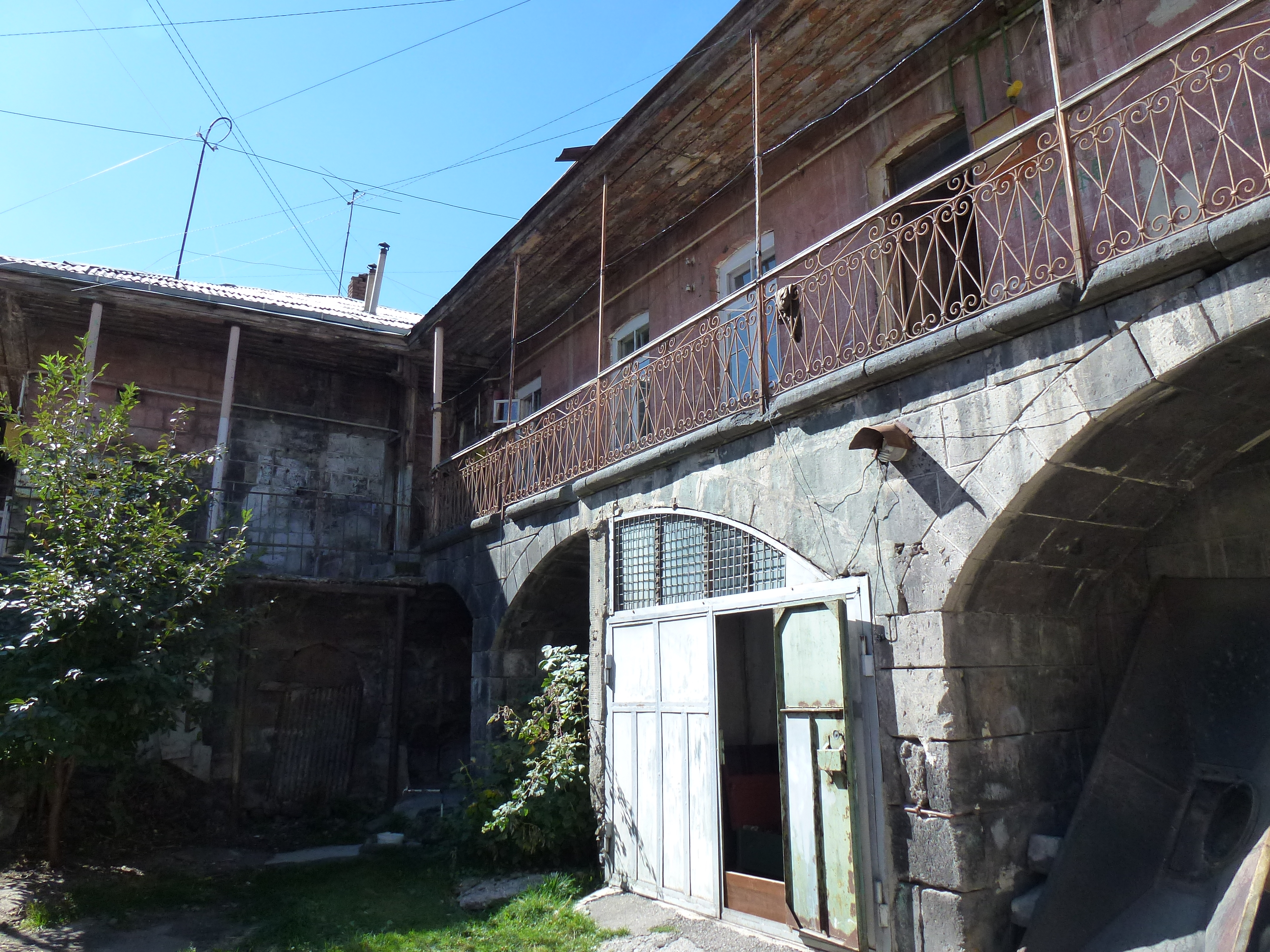 Բնակելի տուն Կումայրի արգելոցում 1/4.86